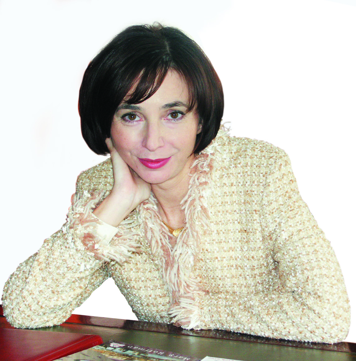 Małgorzata Cebo-Foniok